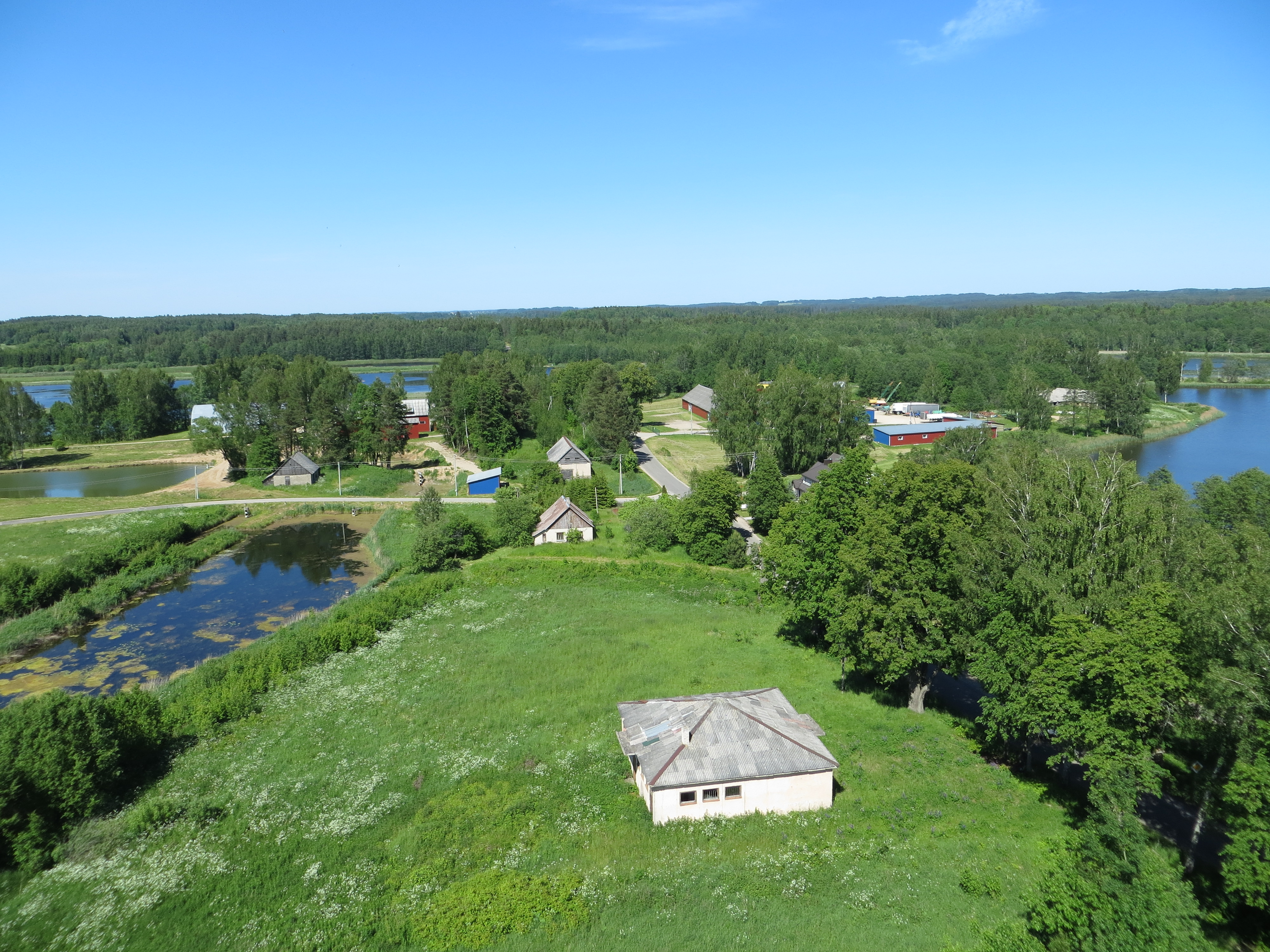 Vasaknos 32241, Lithuania